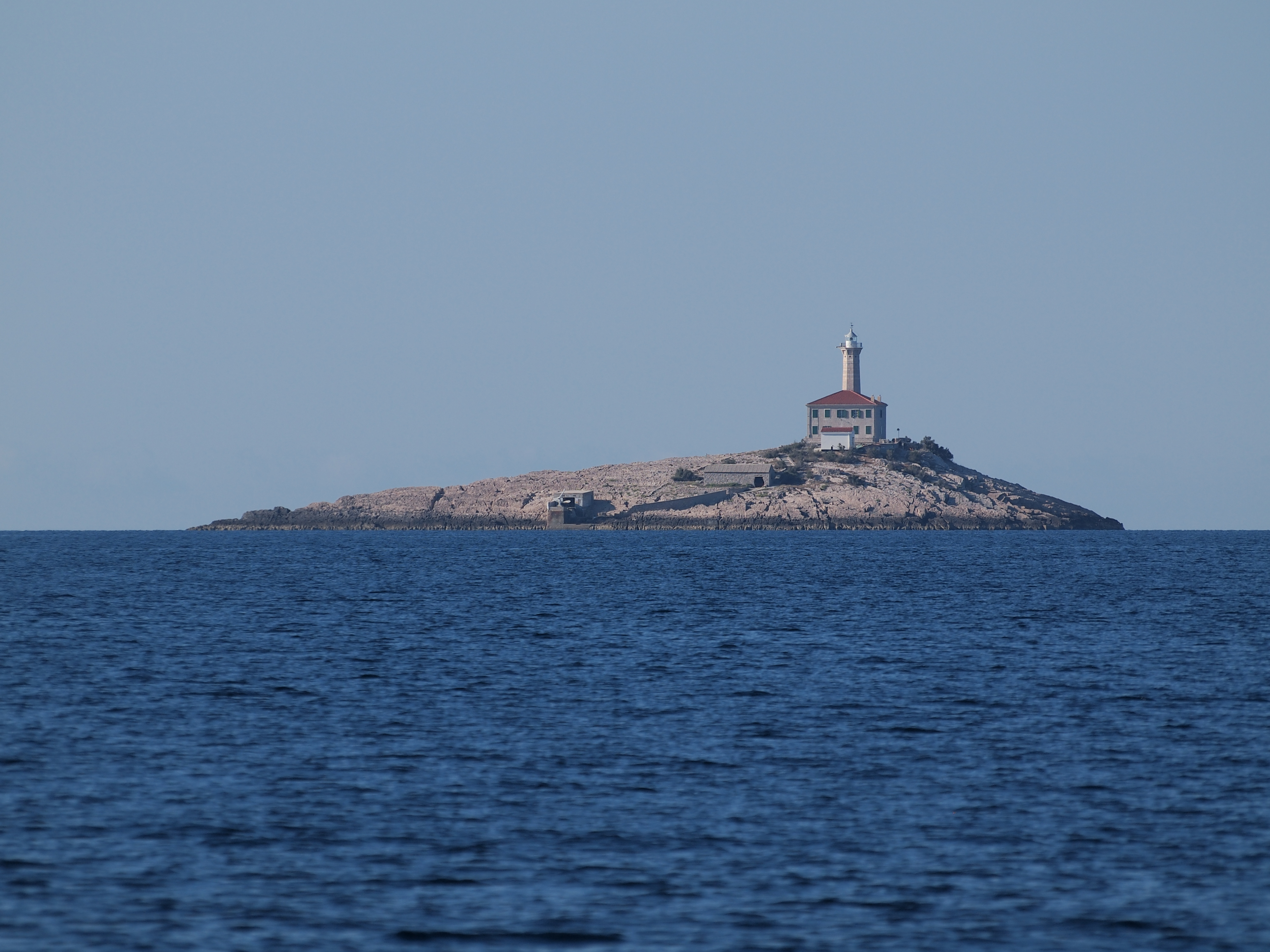 Leuchtturm Blitvenica, 21m hoch, Kroatien, erbaut 1872, Standort Object location43° 37′ 30.67″ N, 15° 34′ 28.11″ E Kennung: Fl(2) W. 30s 38m 24sm